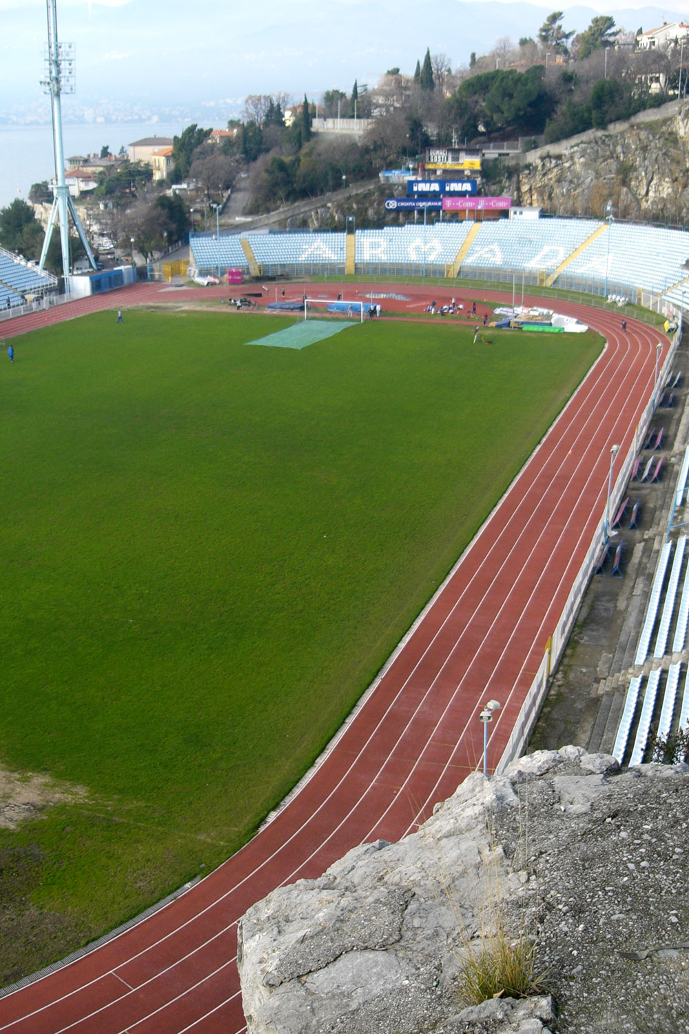 Kantrida stadium, Rijeka, Croatia